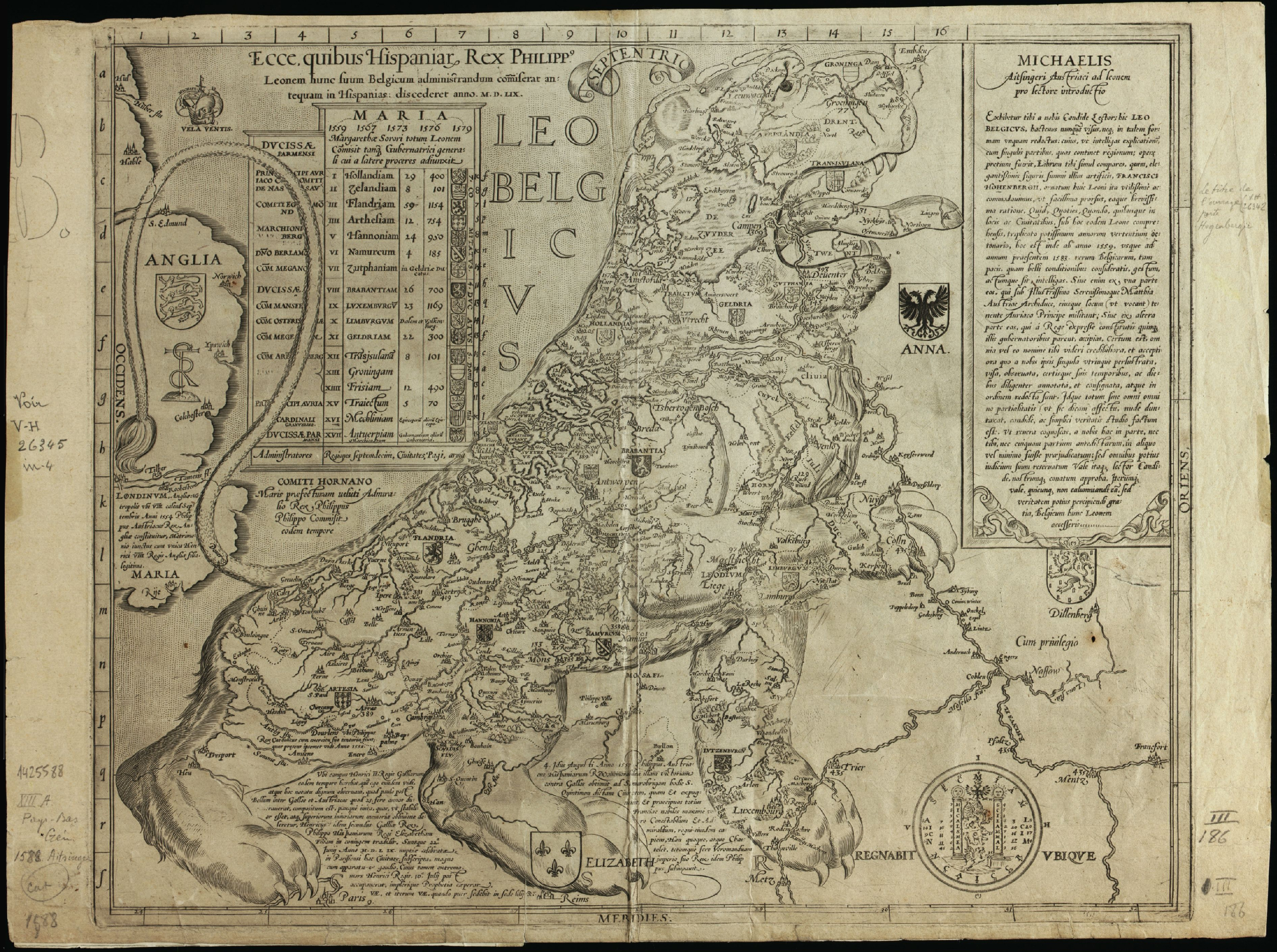 title= Leo Belgicus; size=37x44cm; from: "De Leone Belgico"